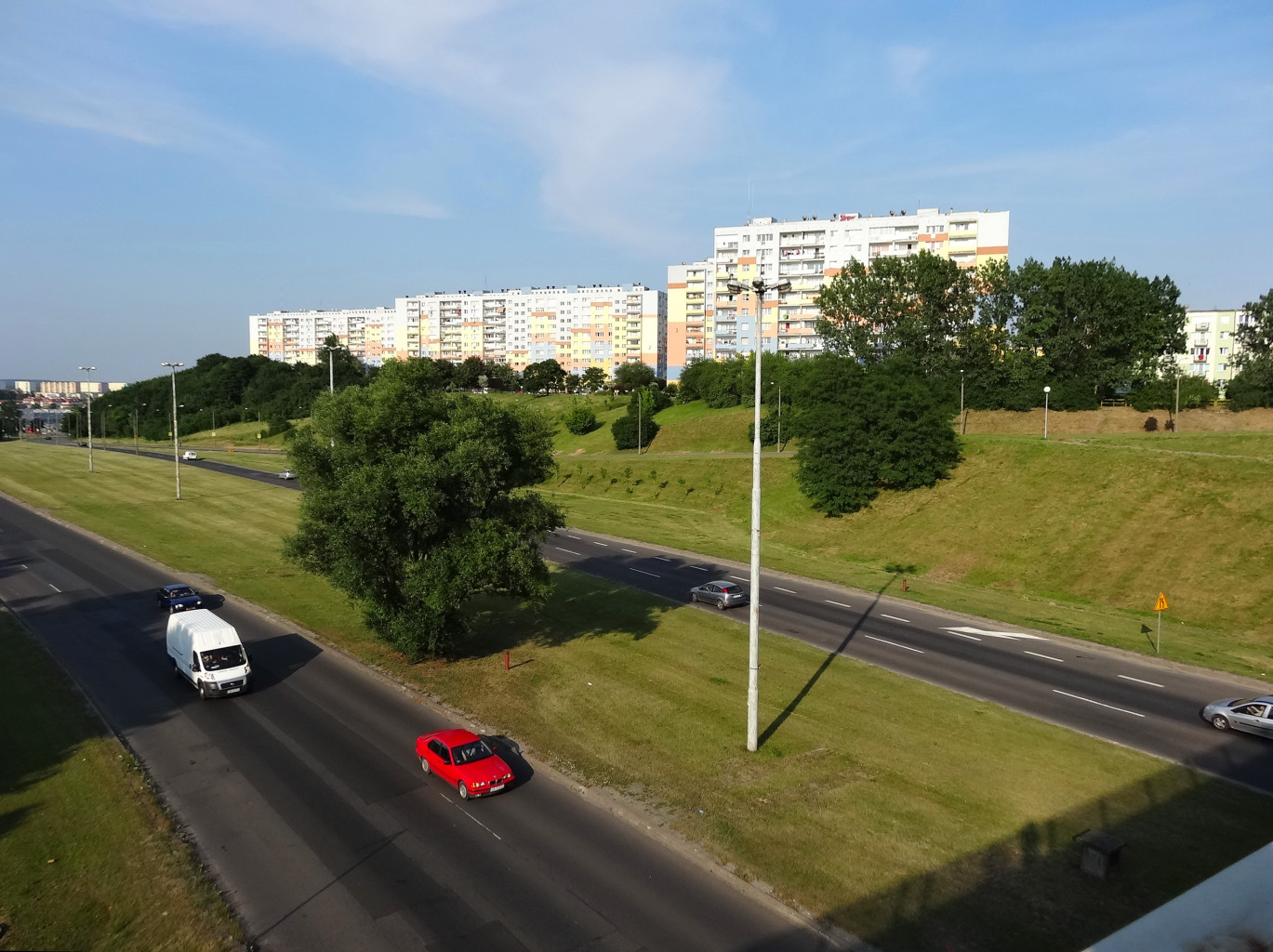 Osiedle Wyżyny w Bydgoszczy - widok ze Wzgórza Wolności